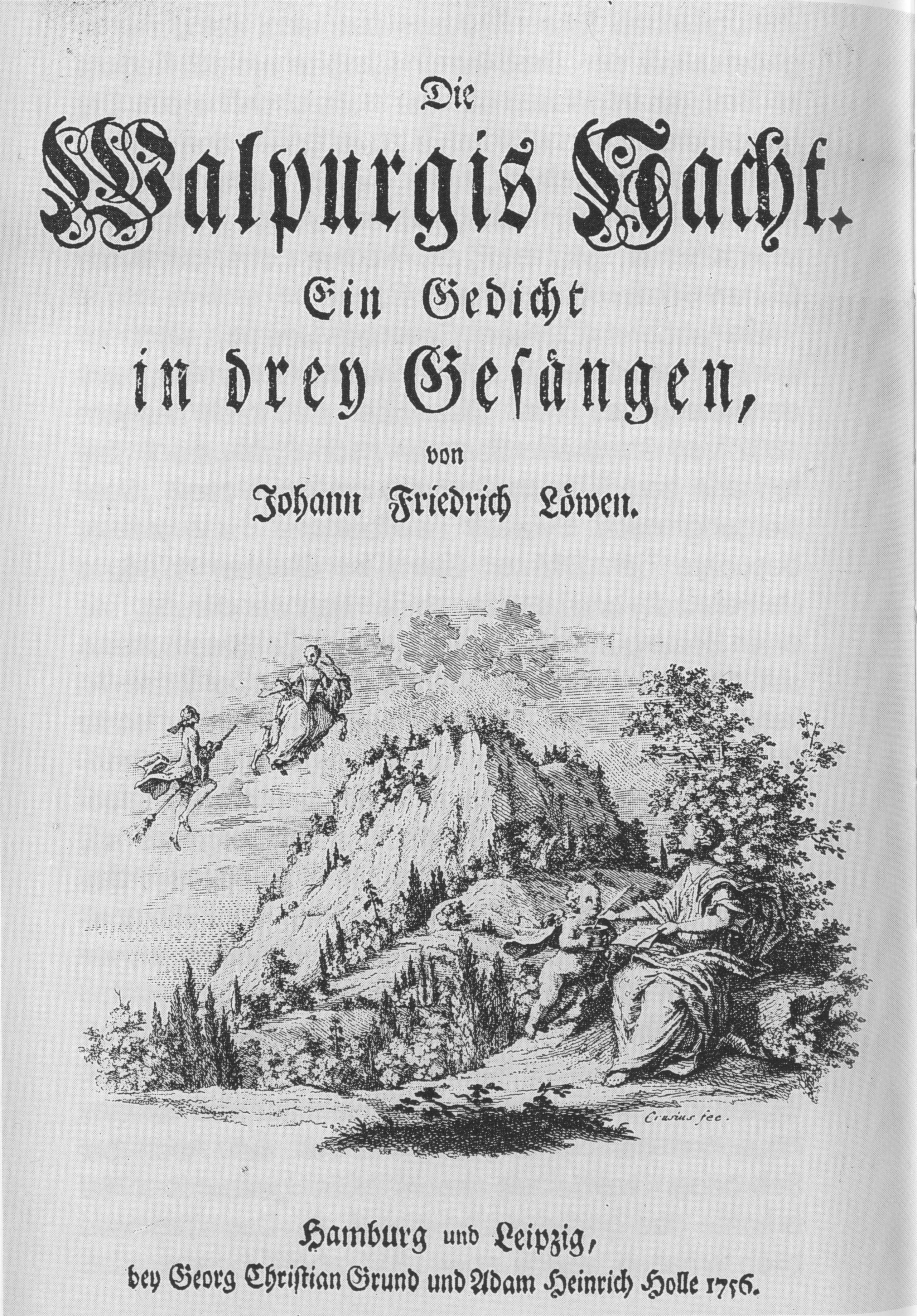 Titelseite des Werkes Die Walpurgis Nacht. Ein Gedicht in drey Gesängen von Johann Friedrich Löwen